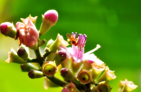 Abelha polizinando a flor